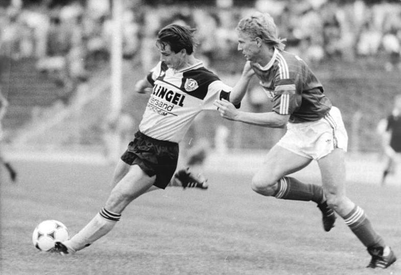 ADN-Settnik-2.6.90- Berlin: Fußball-Pokalfinale 1. FC Dynamo Dresden - PSV Schwerin 2:1- Ulrich Ruppach (r, Schwerin) und Jörg Stübner (l, Dresden), der in der 18. Minute mit einem 16-m-Flachschuß den 1:1 Ausgleich besorgt hatte, im Kampf um den Ball. Der DDR-Meister aus Dresden konnte sich vor 5.700 Zuschauern im Jahn-Sportpark gegen die stark aufspielenden Schweriner mit 2:1 durchsetzen und holte sich damit den Pokal zu siebenten Mal.